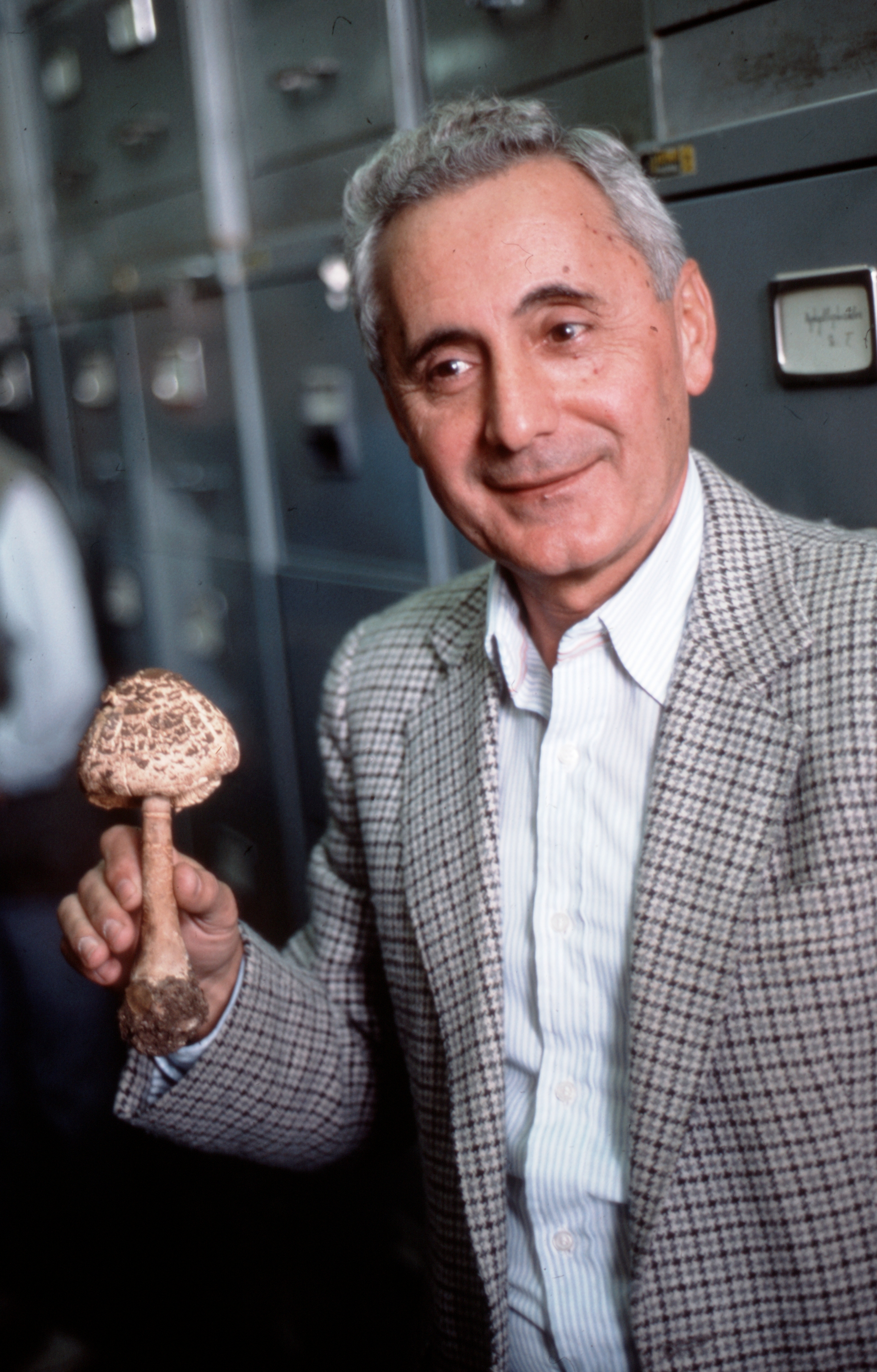 פרופ' ניסן בנימיני